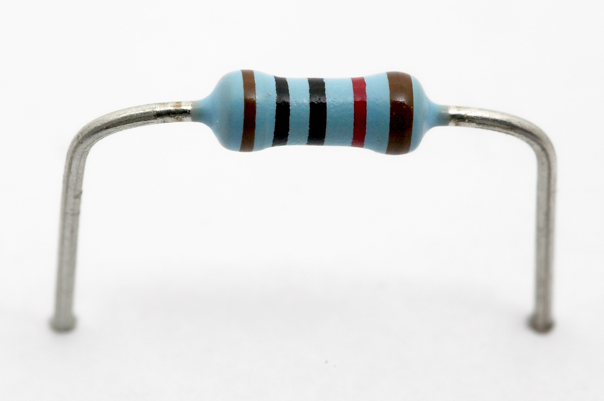 10 kOhm Metallschichtwiderstand